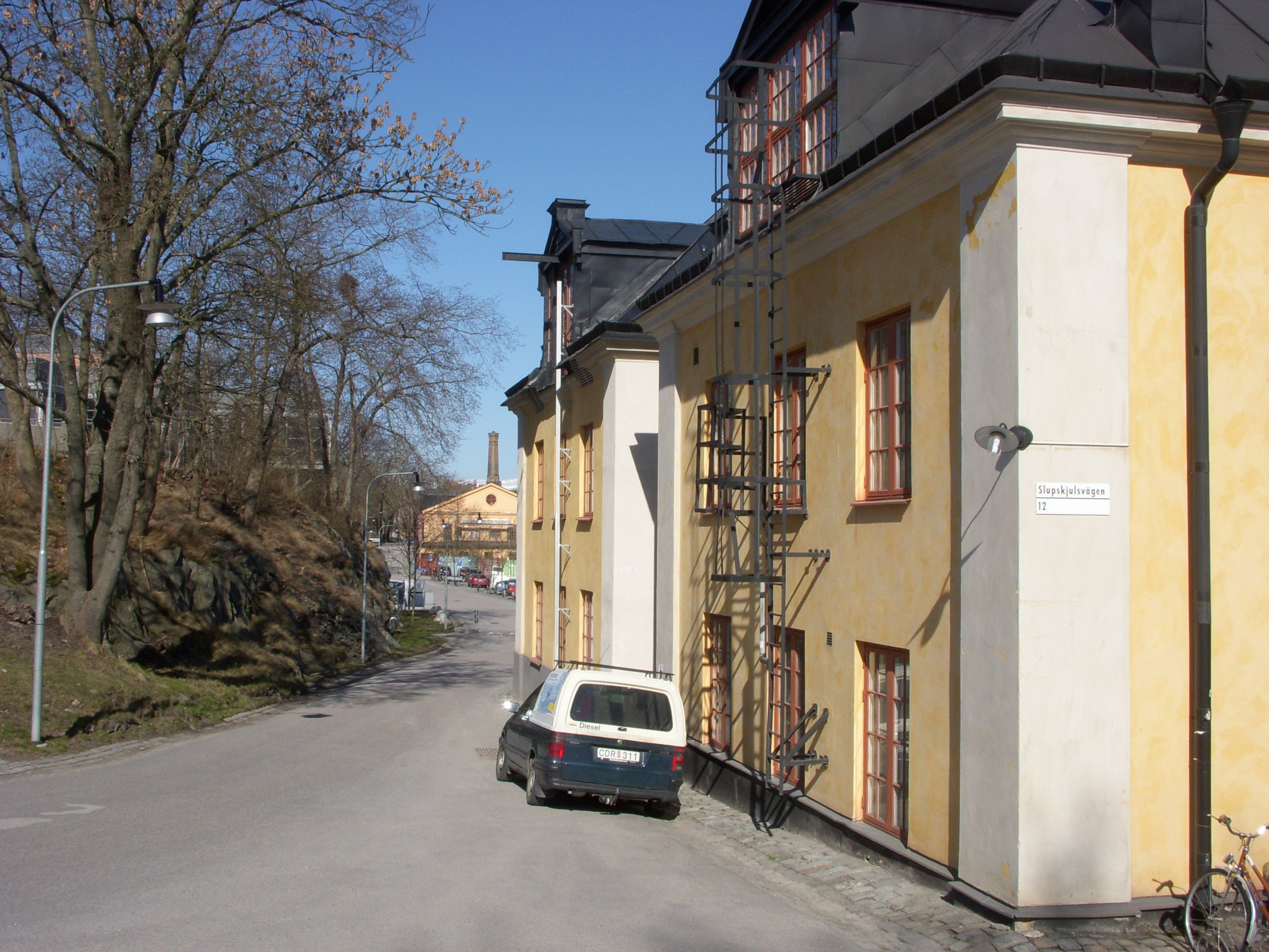 Slupskjulsvägen vid Norra och Södra fundamenet på Skeppsholmen